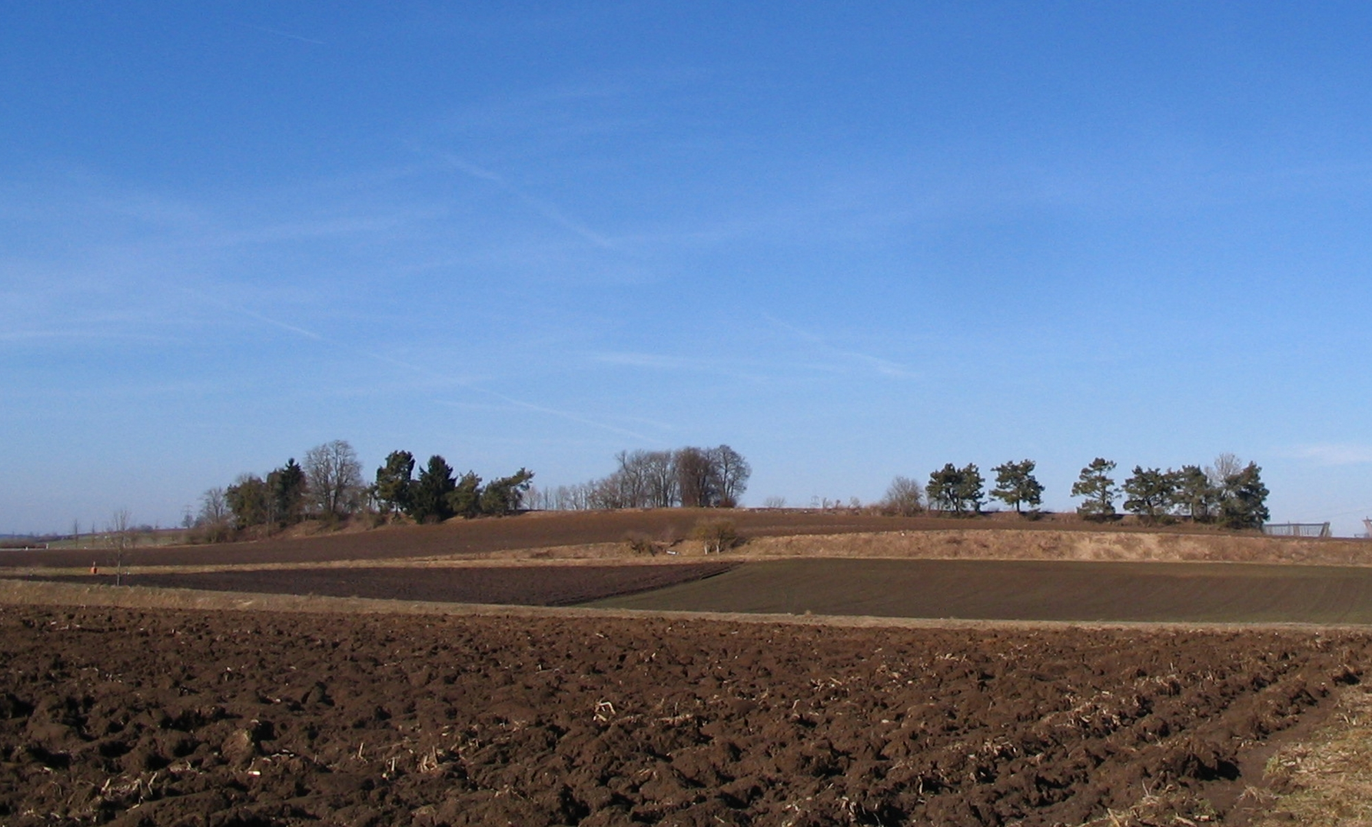 Kastell Pförring, Landkreis Eichstätt, Oberbayern: Verbliebenes Plateau